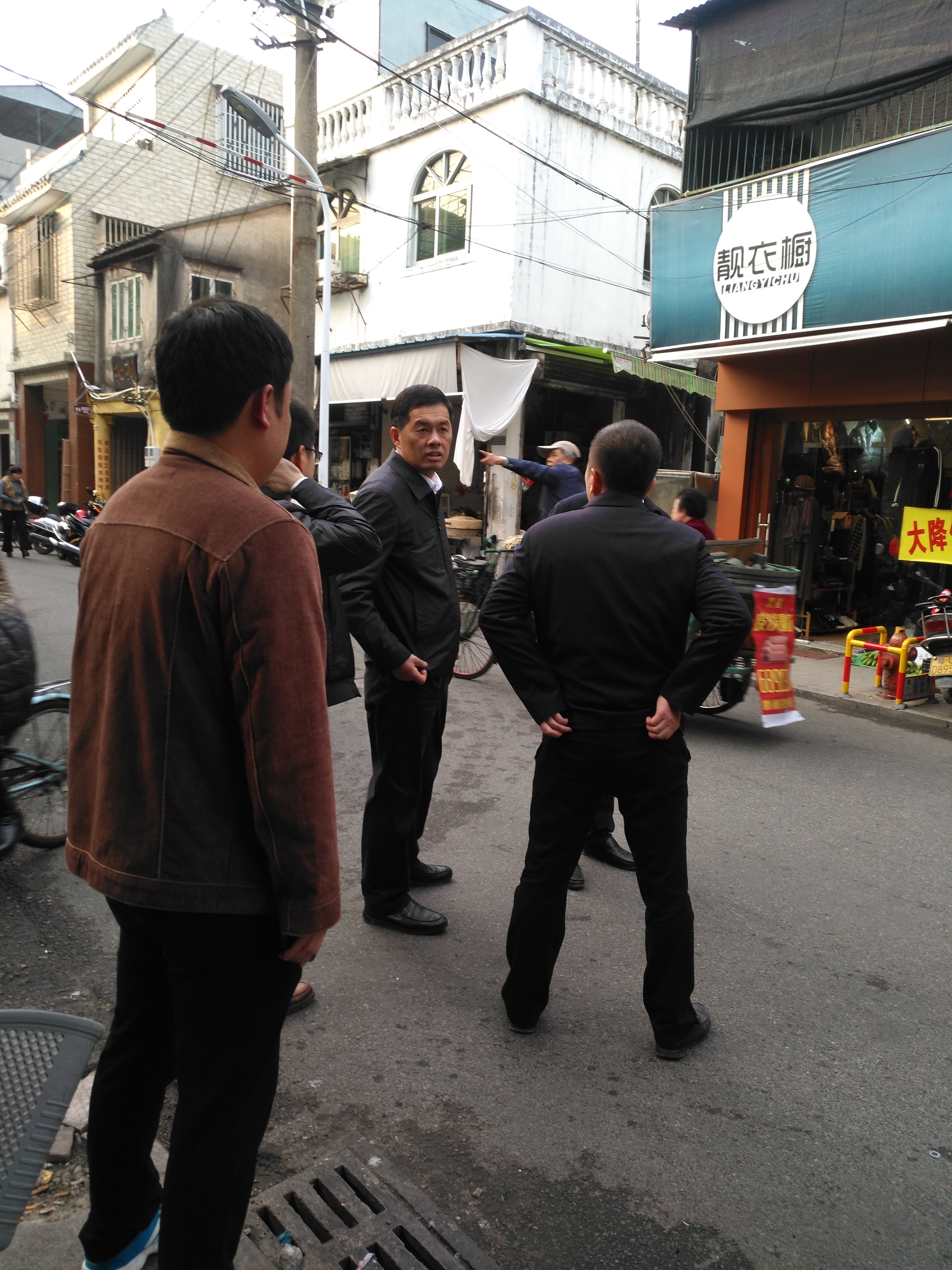 2018年2月10日下午，中共潮州市委书记刘小涛在市区西马路视察。